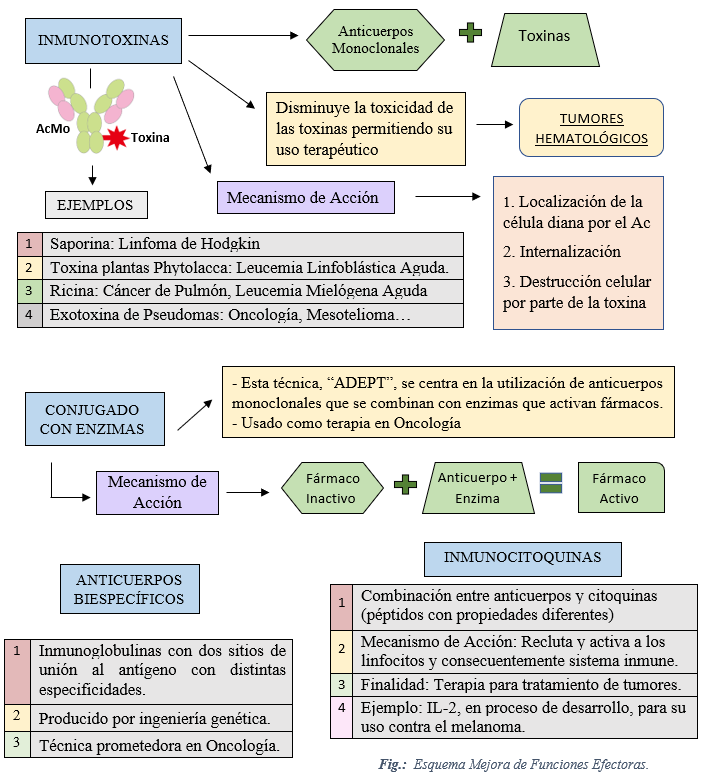 Tabla resumen de los procesos de Mejora de las Funciones efectoras de los Anticuerpos Monoclonales